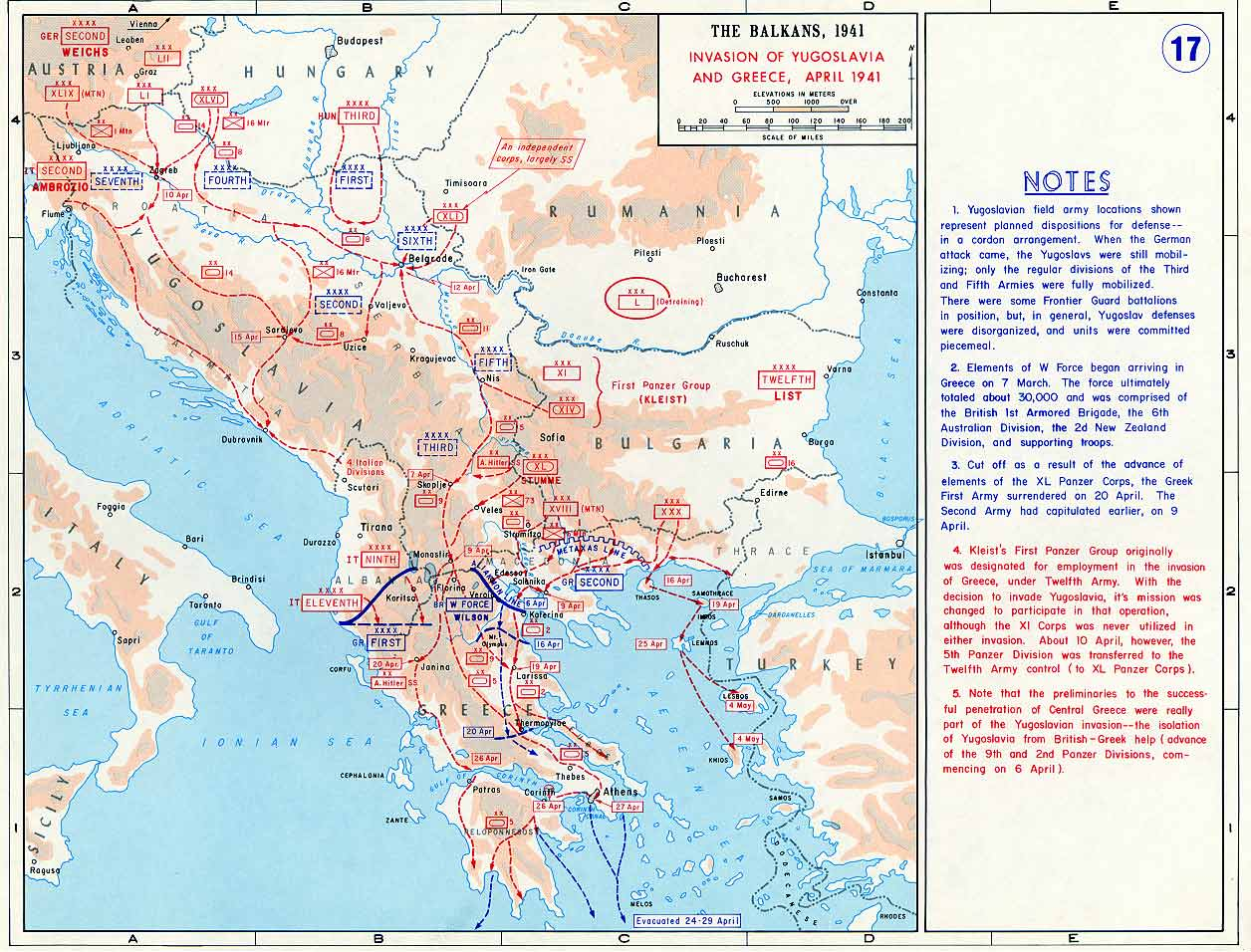 Operațiunile militare ale Axei în Balcani